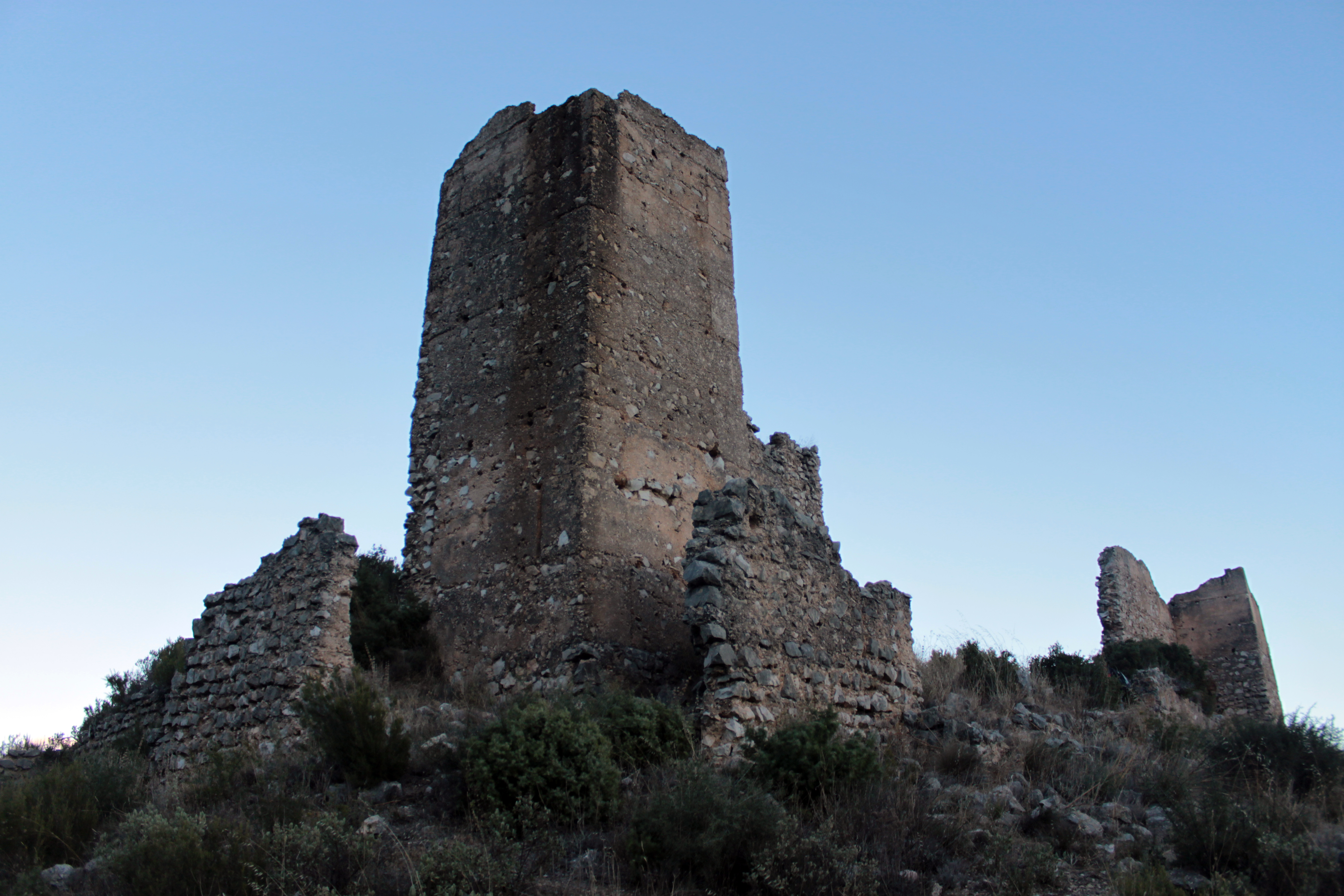 Castillo de Chera localizado en un cerro próximo a la población que le da nombre en la comarca de Requena-Utiel, provincia de Valencia, Comunidad Valenciana, España. Vista de la torre occidental y a su derecha e izquierda parte de la barbacana que rodeaba el conjunto. Al fondo a la derecha aparece la torre sur.